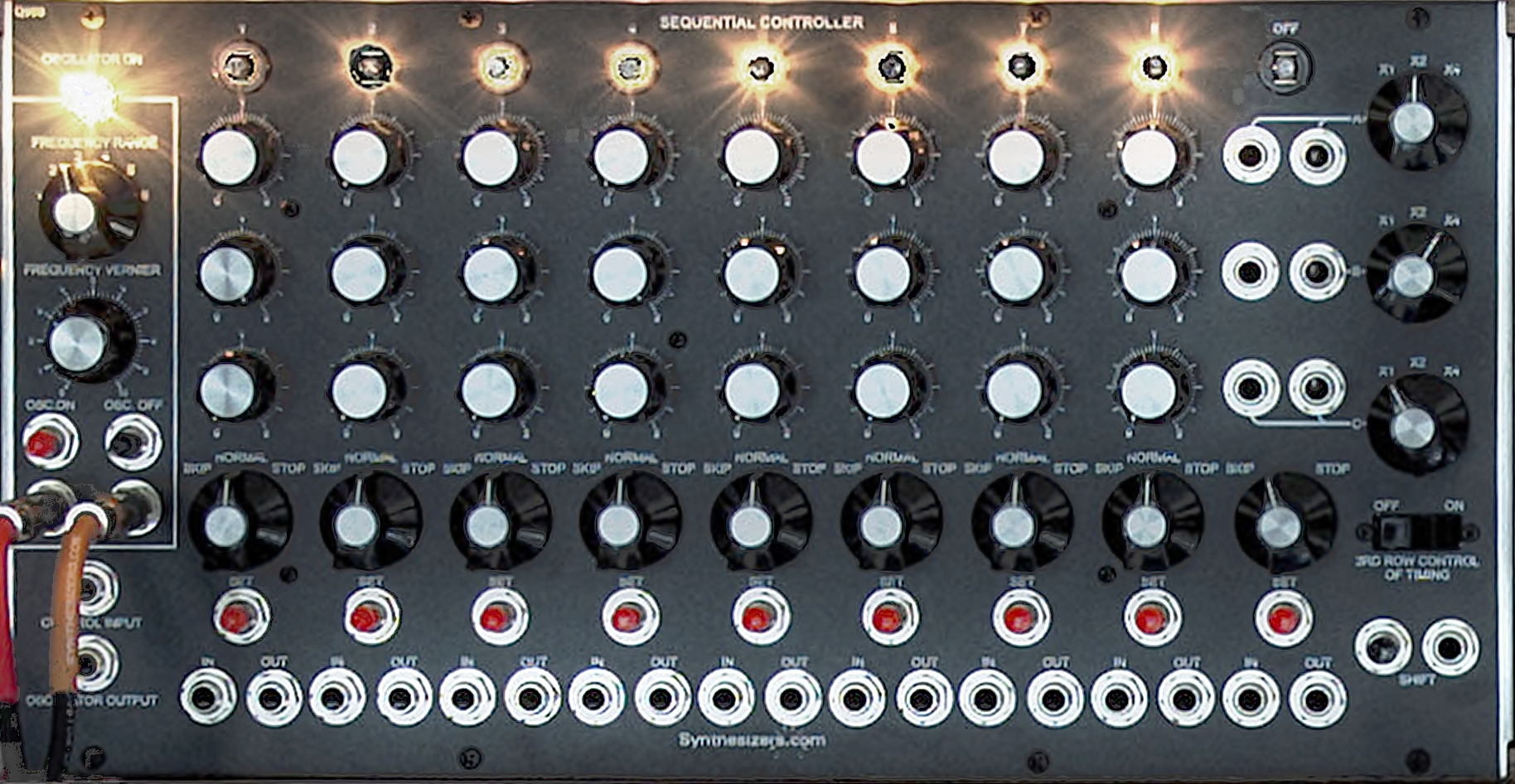 Q960 Sequential Controller module